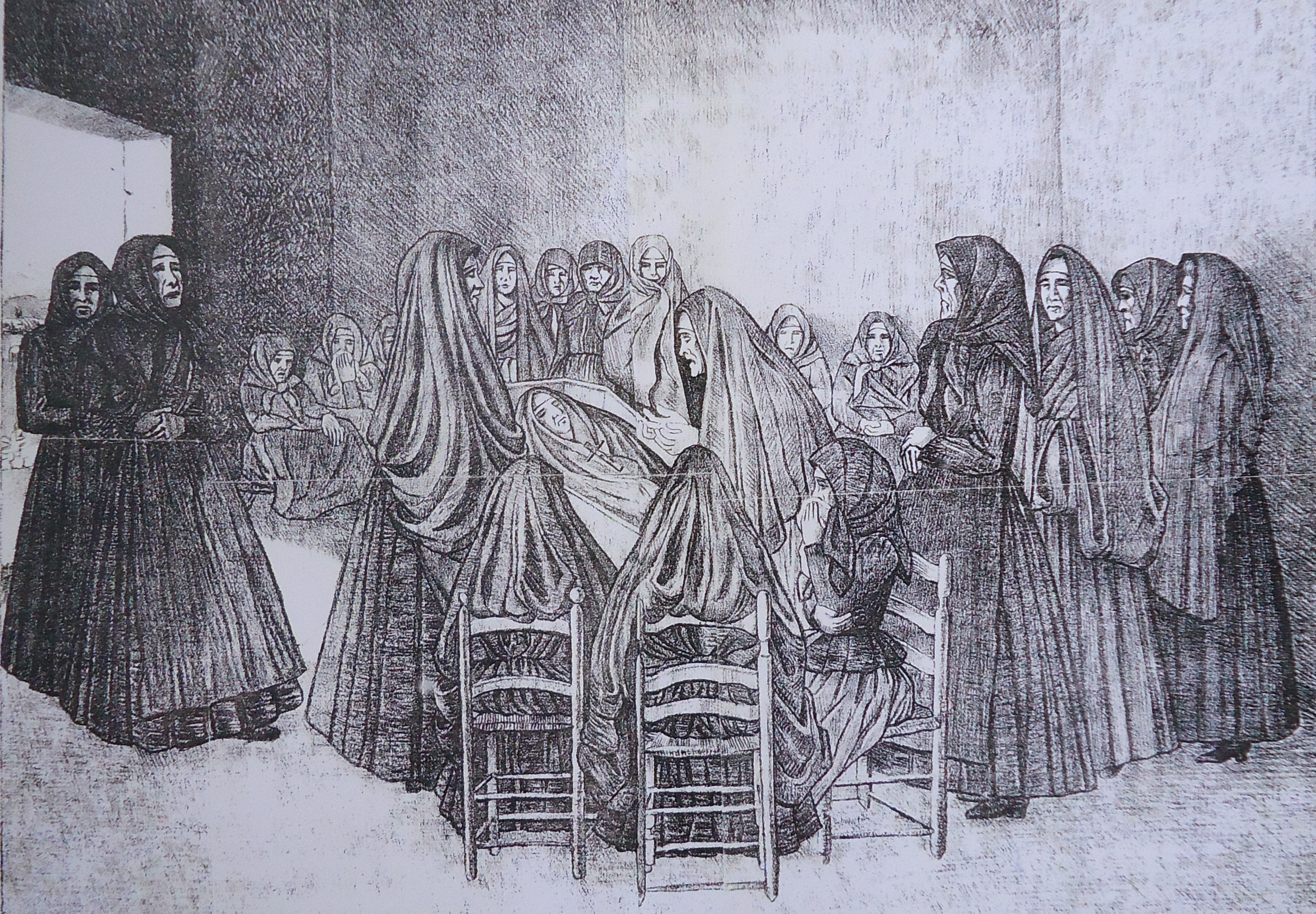 L'immagine edita dalla presentazione dell'opera - in 10 volumi in folio + Indici - pubblicata su L'Italia dialettale Sup. 1°, serie II, 1932.